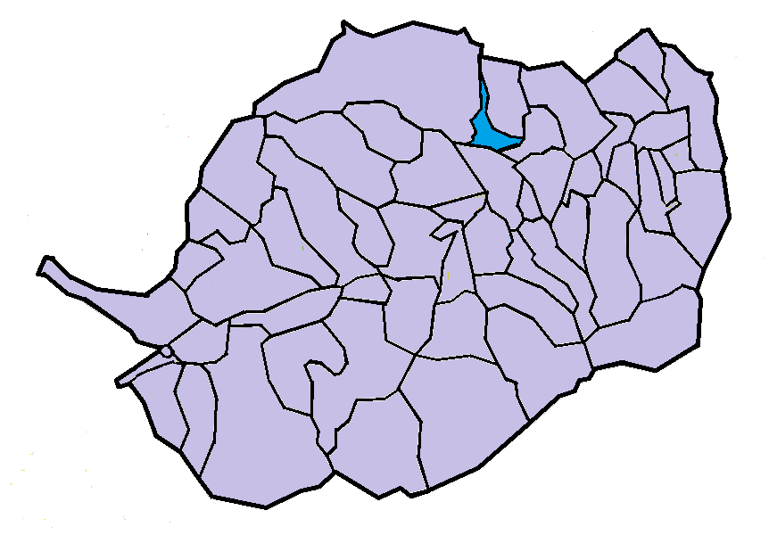 Campome en el Conflent, a partir del mapa municipal del Conflent de lliure disposició adaptat al Nomenclàtor toponímic aprovat el 2007